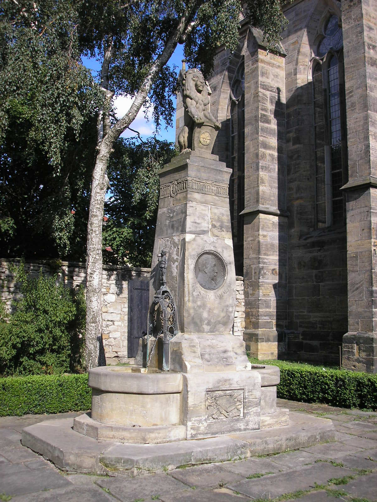 Der Gustav-Adolf-Brunnen vor der Predigerkirche in Erfurt.